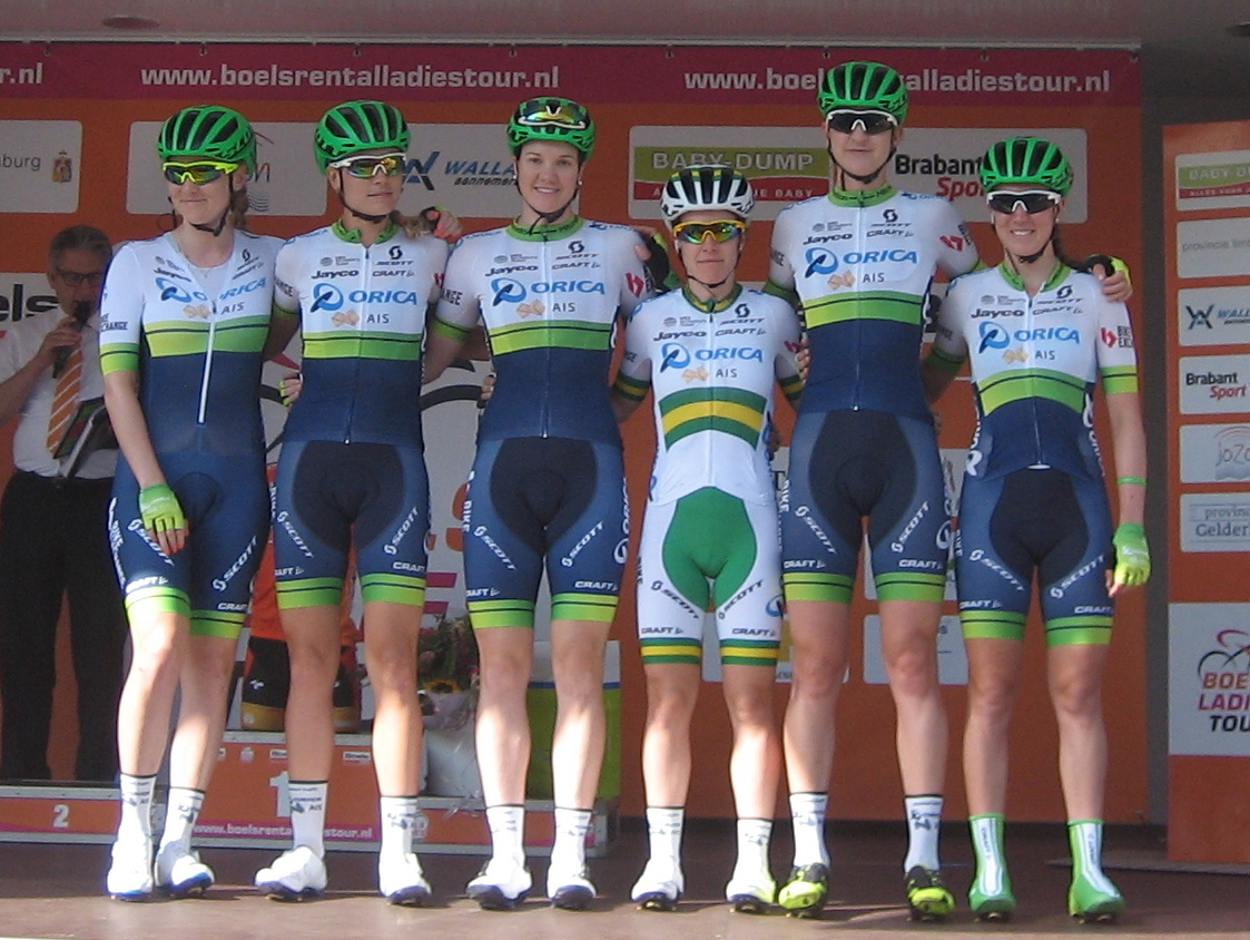 Team Orica-AIS voor start 3e etappe Holland Ladies Tour 2016